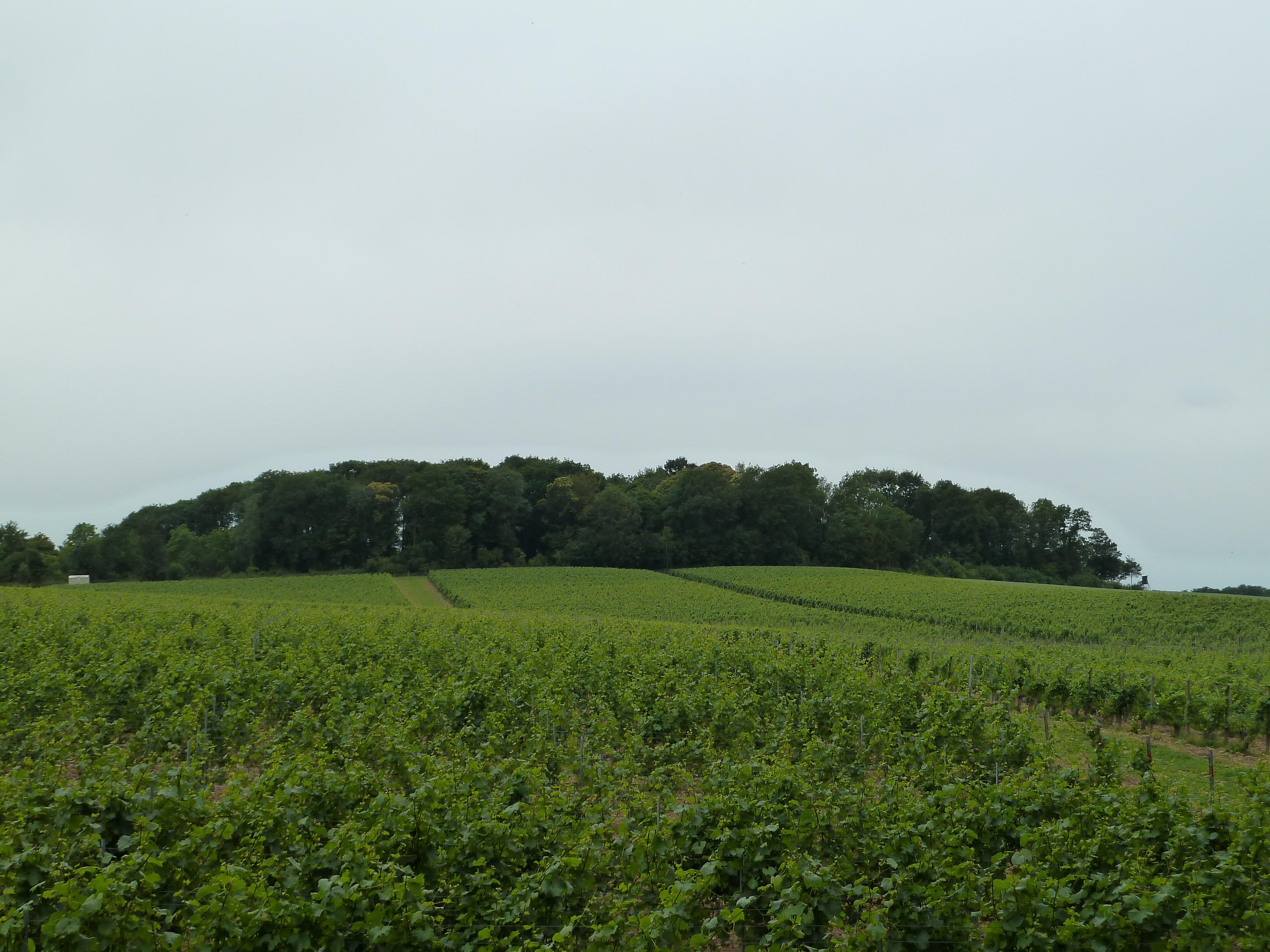 Tumulus Genoelselderen, Riemst, Belgique